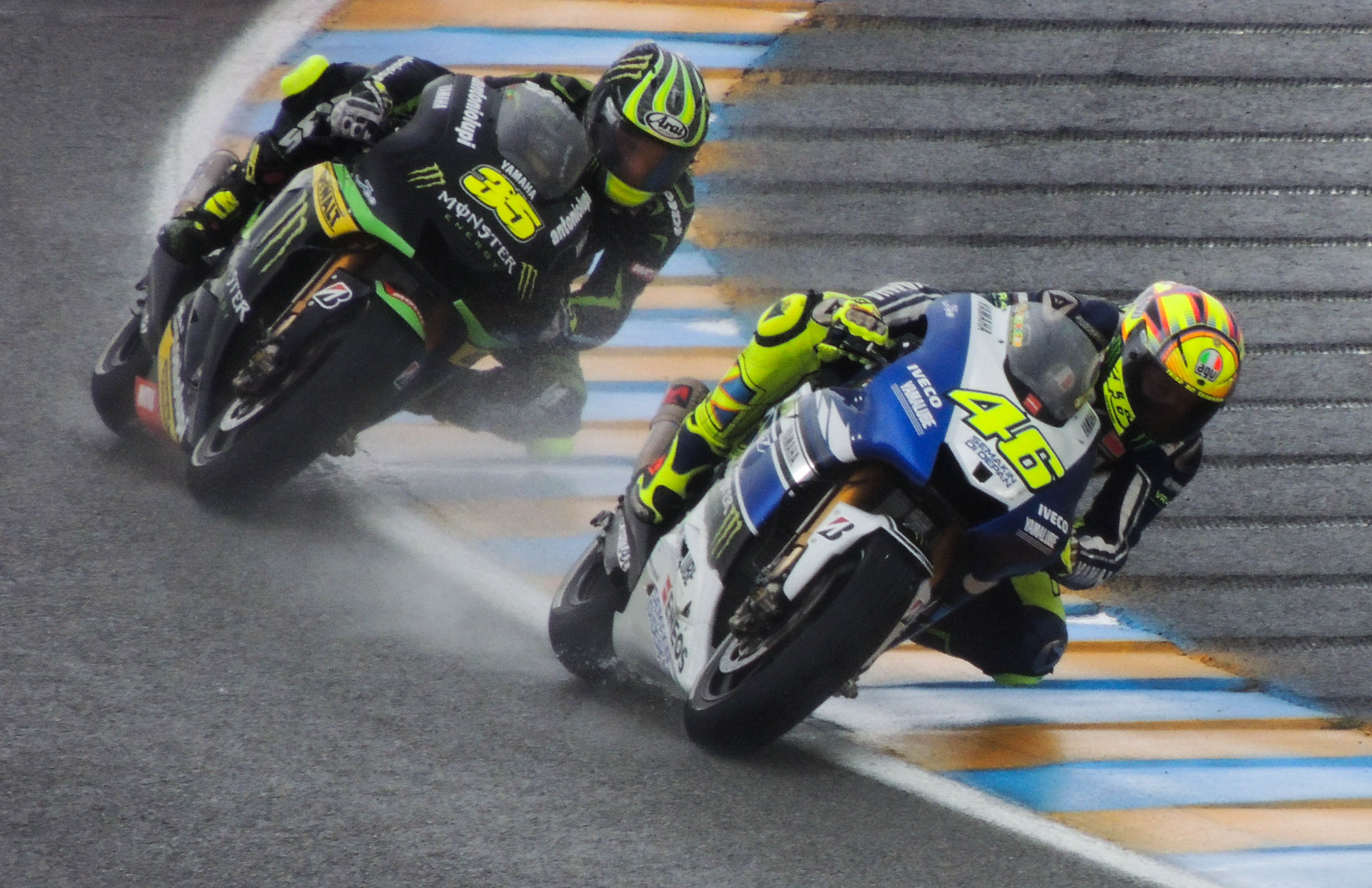 Valentino Rossi et Cal Crutchlow lors du grand prix de France moto au Mans en 2013.